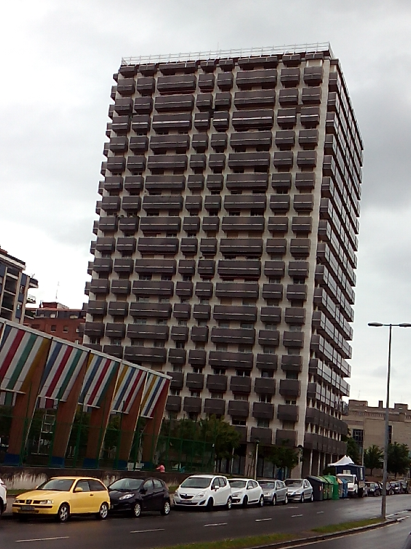 Anoetako dorrea